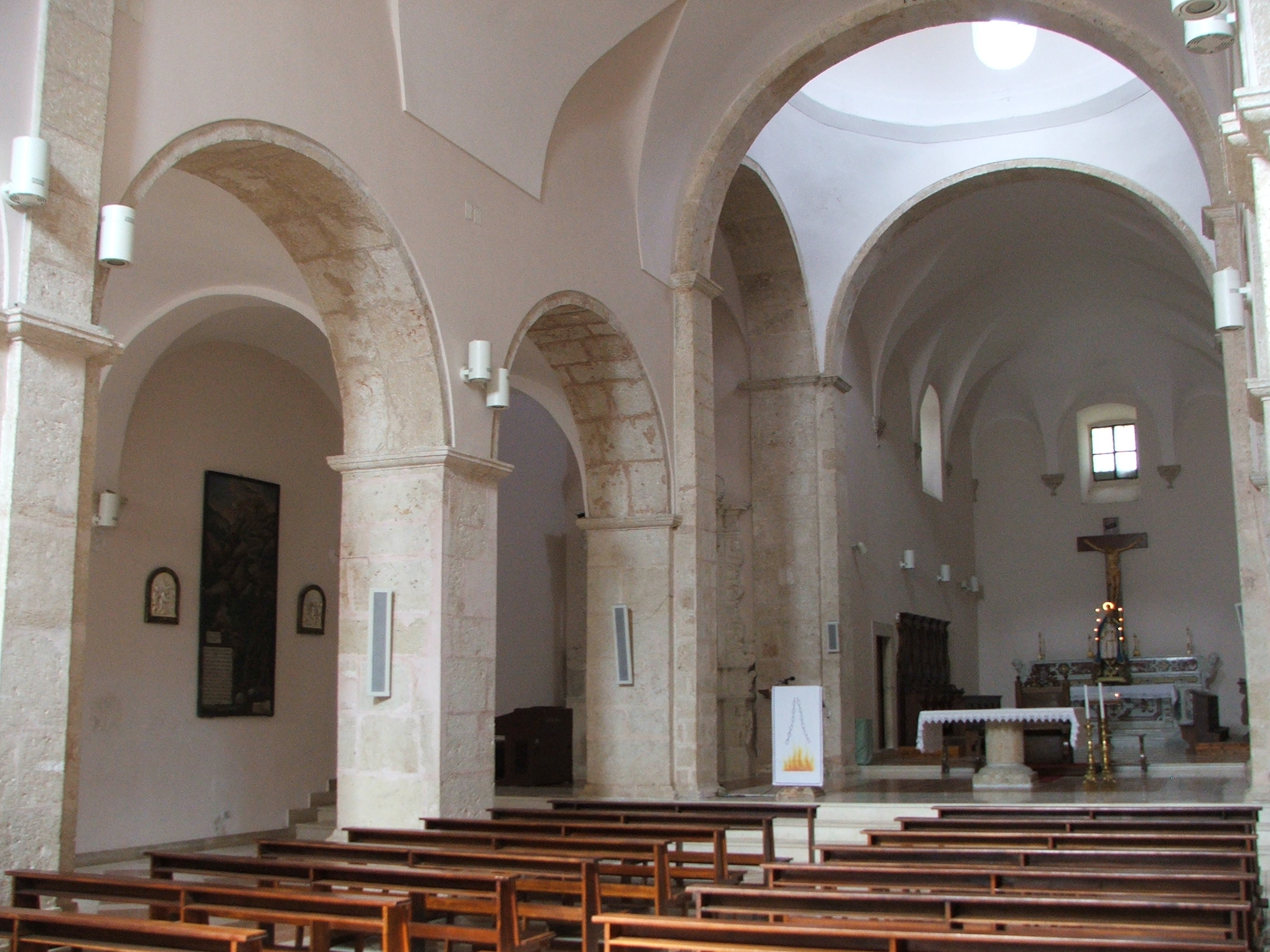 Navata del Santuario mariano di Stignano di San Marco in Lamis